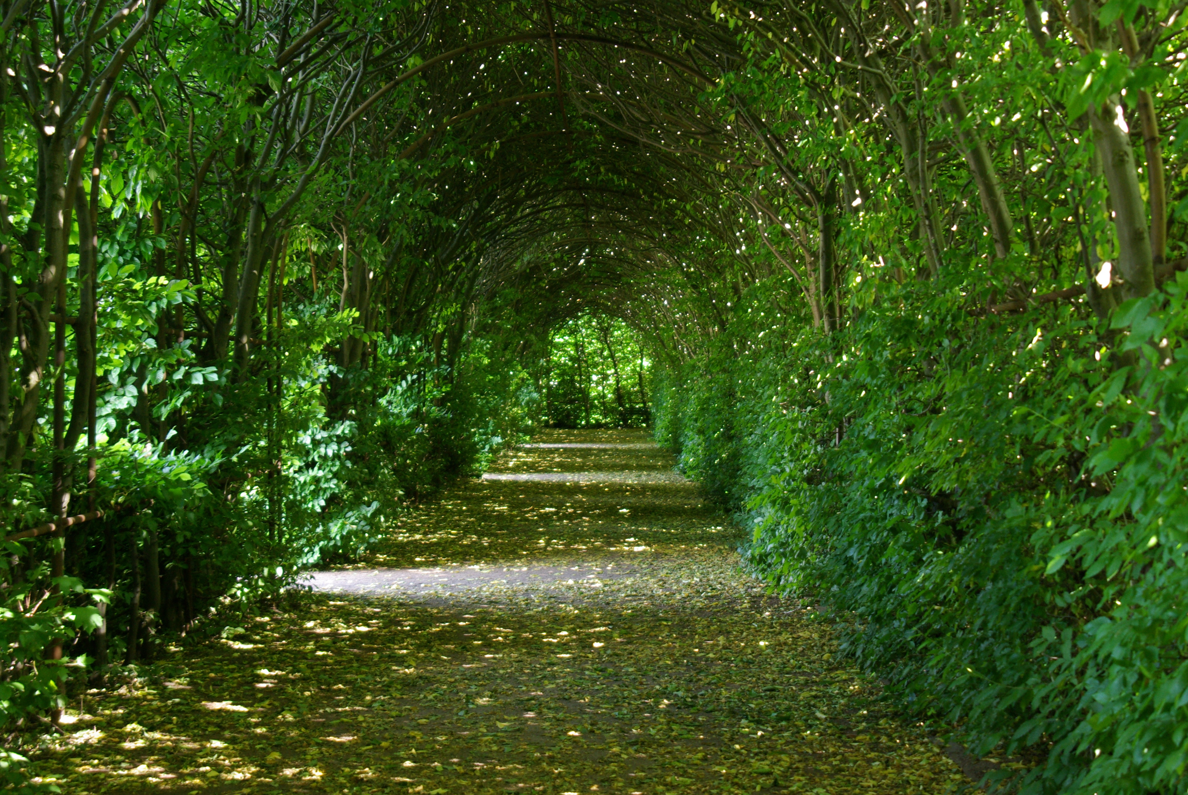 Güstrow in Mecklenburg-Vorpommern. Der Laubengang befindet sich im Park des Schlosses.